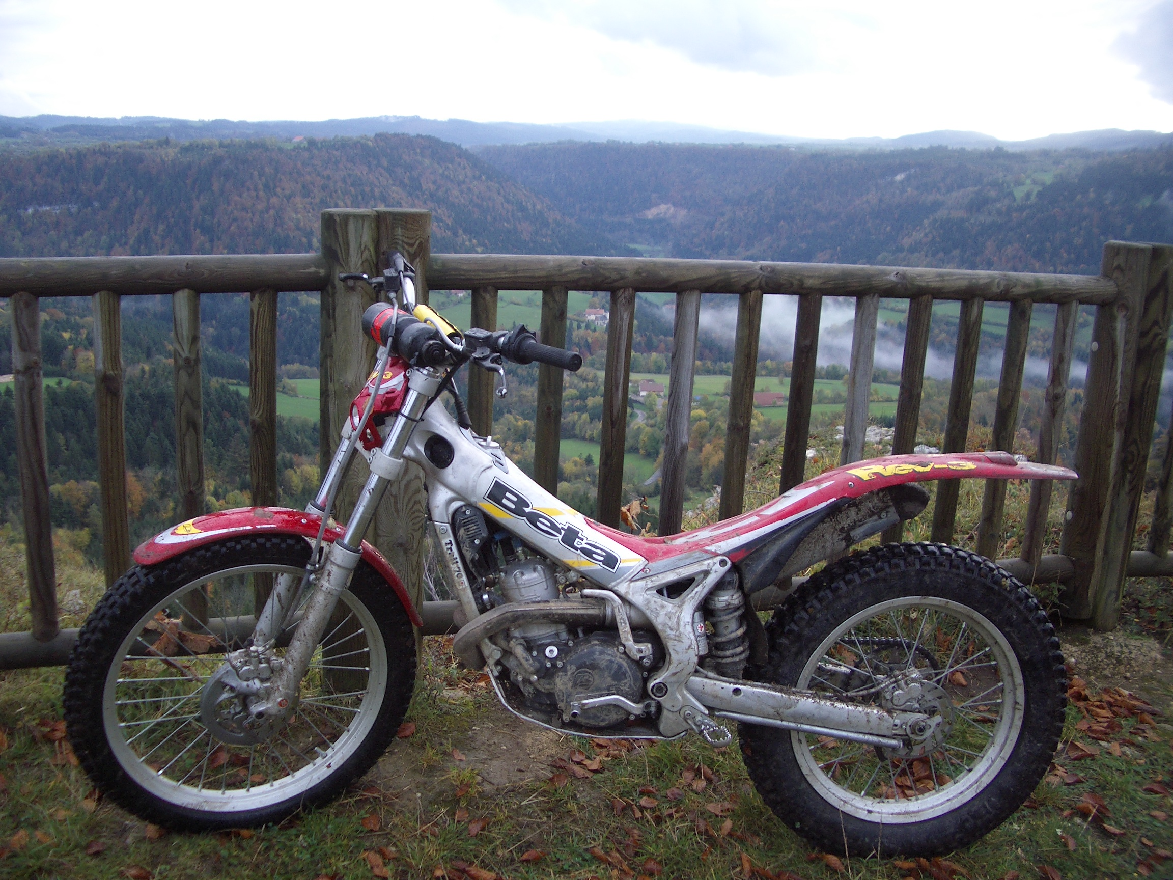 Beta REV-3 trial motorcycle